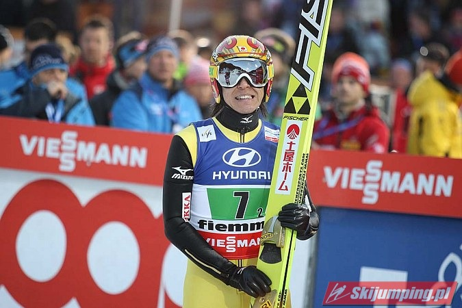 Konkurs drużynowy mężczyzn na skoczni K-120